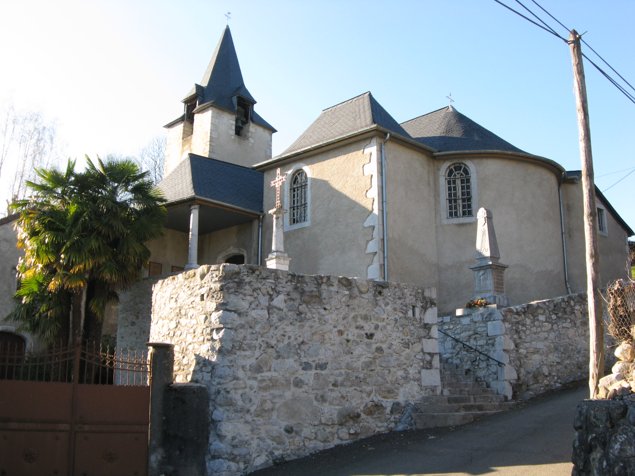 Eglise Saint Lizier de Bescat vue depuis la rue (Pyrénées-Atlantiques) (Pyrénées).